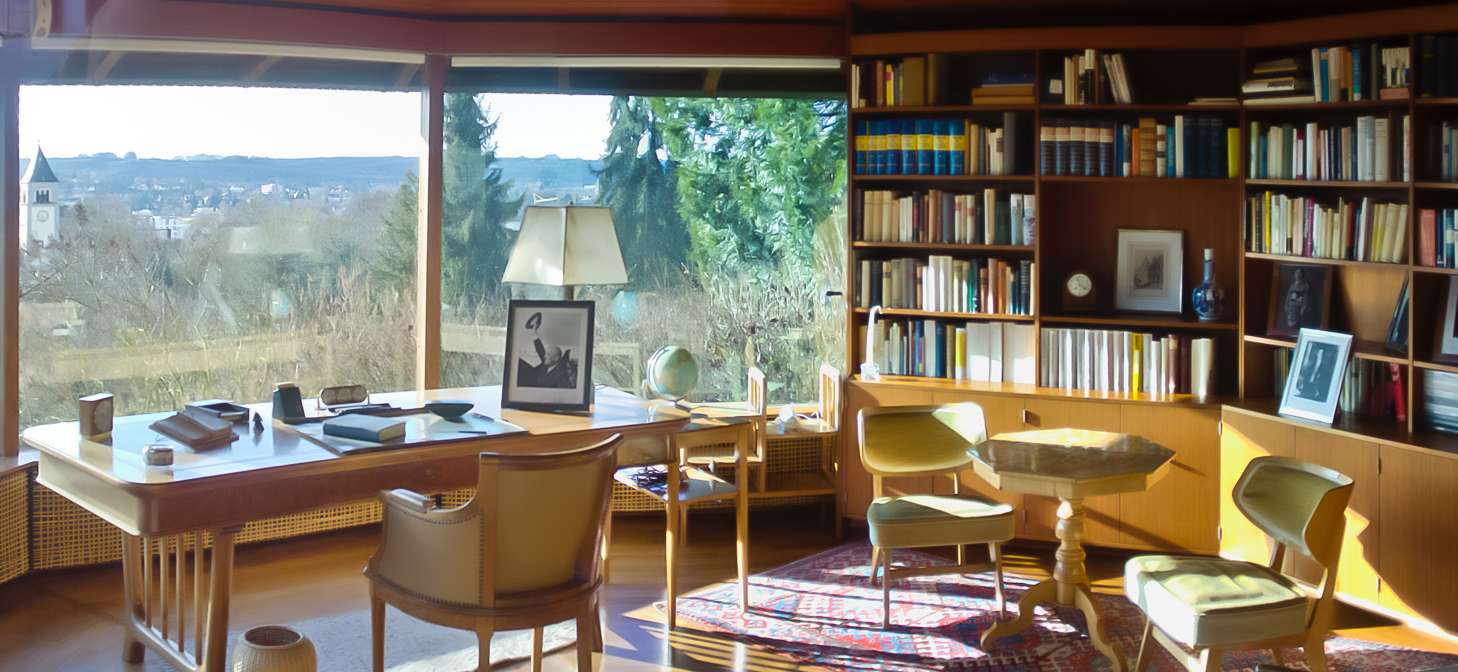 Bundeskanzler-Adenauer-Haus. Blick von außen in den Pavillon im Garten.